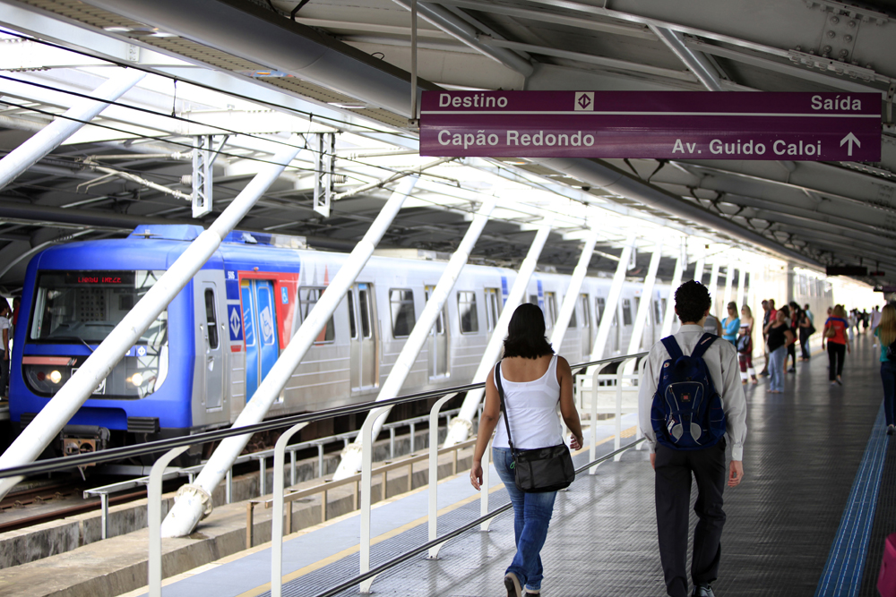 Crédito: Arquivo/ANPTrilhos